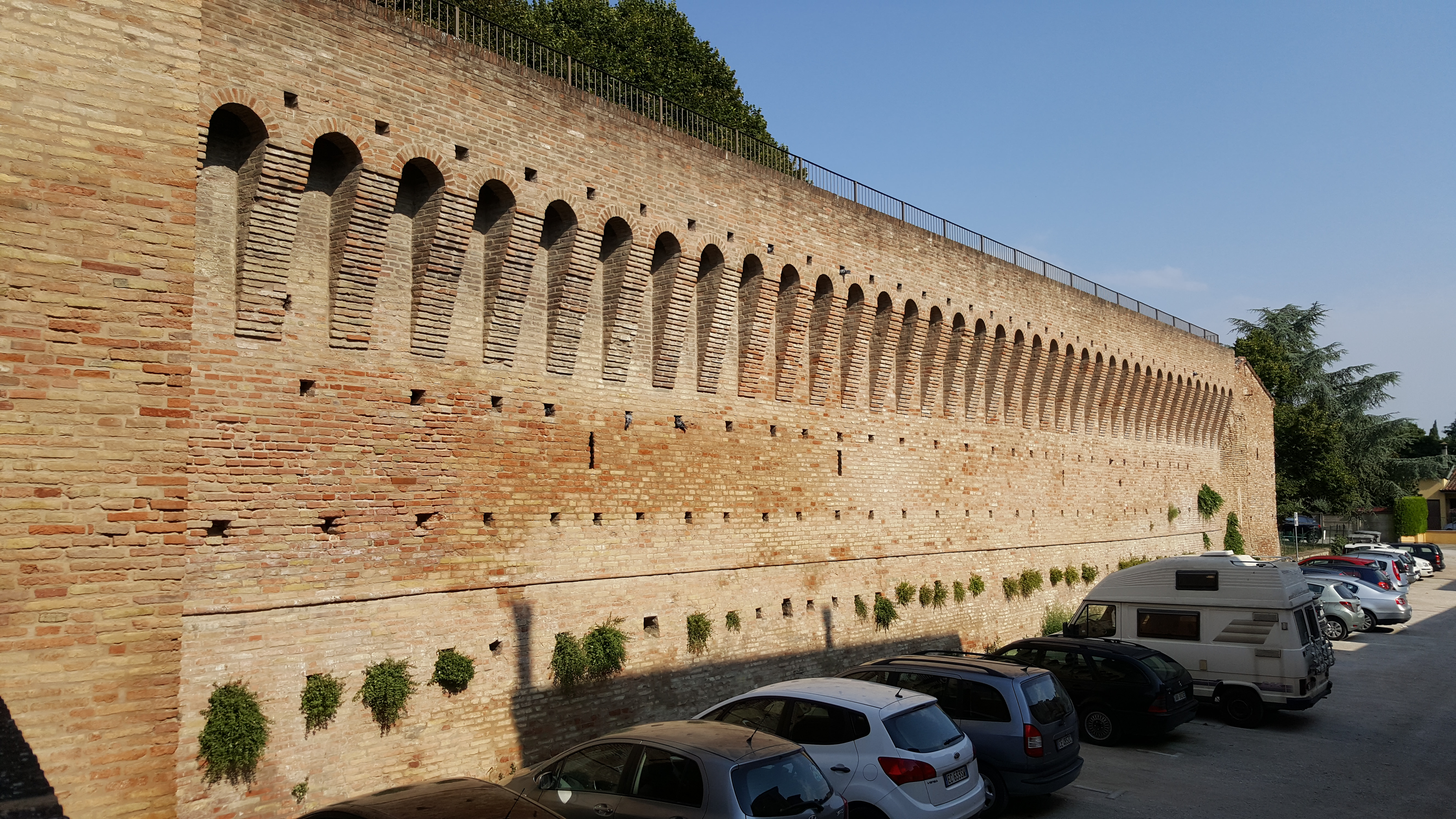 Beccatelli di destra This is a photo of a monument which is part of cultural heritage of Italy.